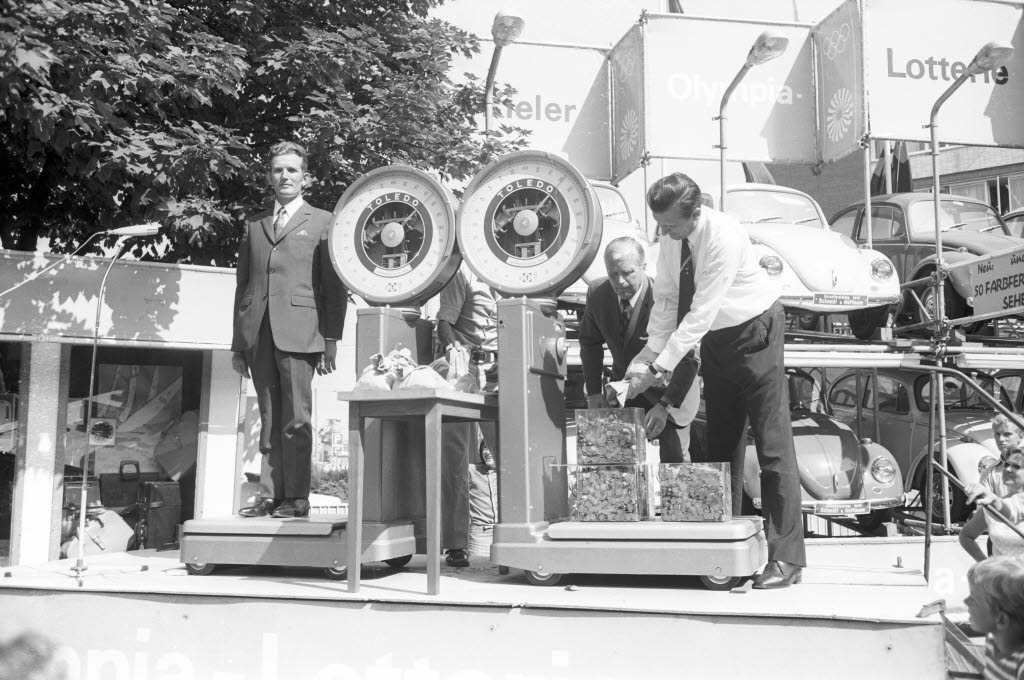 Der zehnmillionste Käufer eines Lotterieloses, der Tiefbauarbeiter Kurt Muxfeld aus Schwartbuck, wird am Berliner Platz in Groschen aufgewogen. 77,1 kg muss Oberbürgermeister Günther Bantzer (in Hemdsärmeln), assistiert von Magistratsrat Hannes Leidemer, bewegen - für Muxfeld ein Gewinn von etwa 2000 DM.